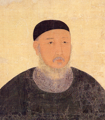 고려의 문신, 시인, 정치인 염제신 초상화